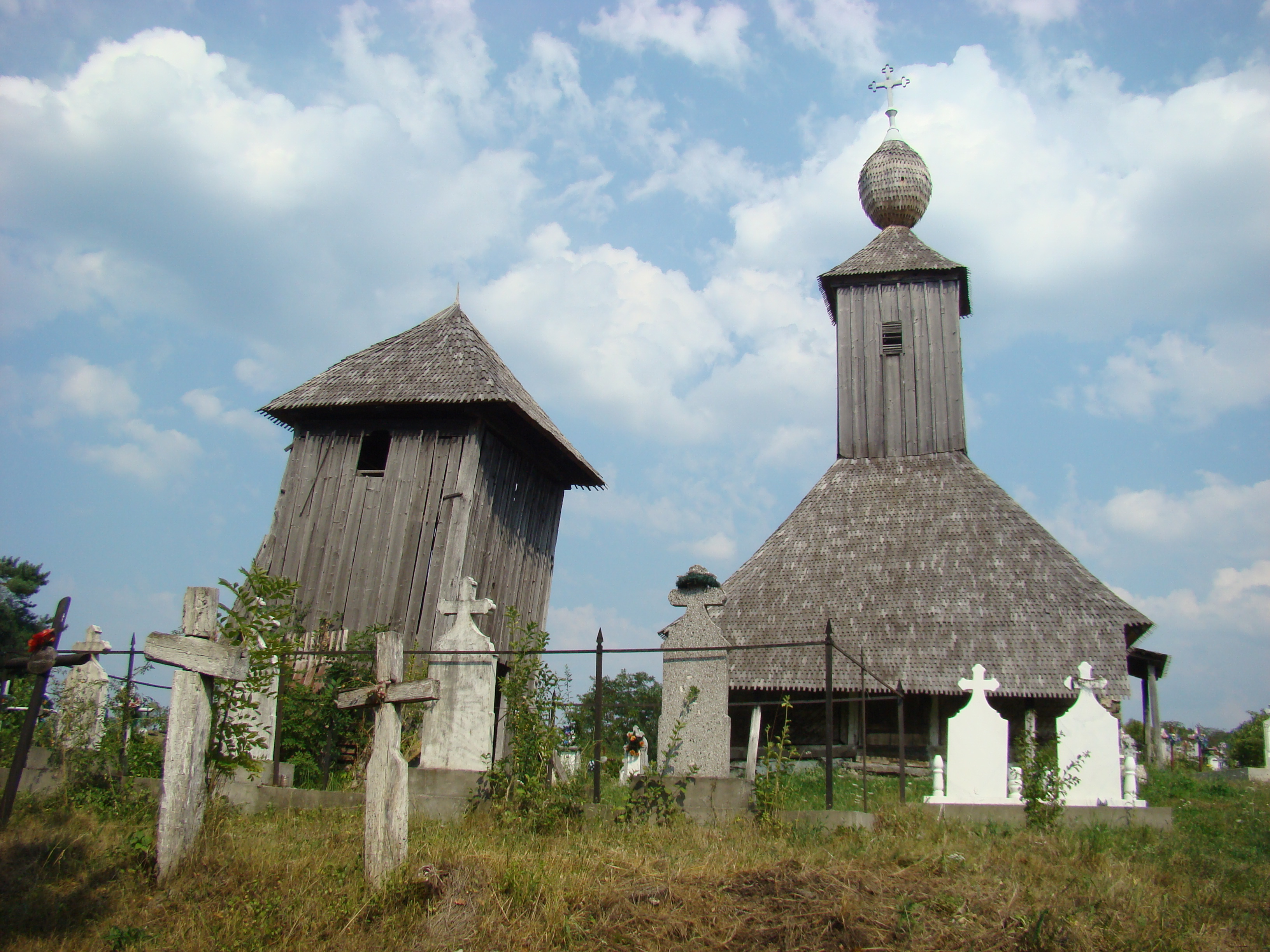 Biserica de lemn „Nașterea Sf.Ioan Botezătorul” din Românești-Timiș